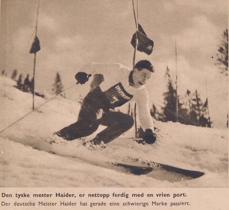 Norwegen 28/2-1943 (Rødkleiva)